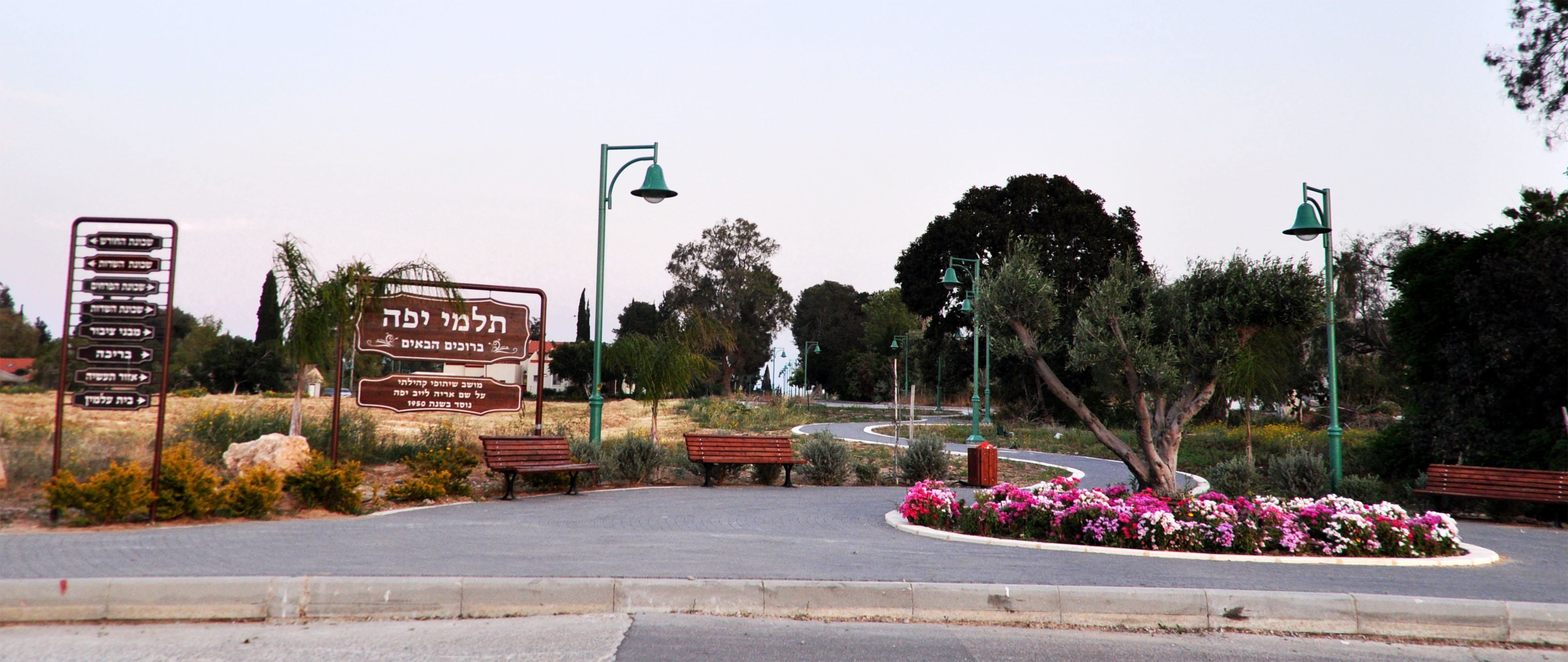 הכניסה לתלמי יפה - אביב 2014